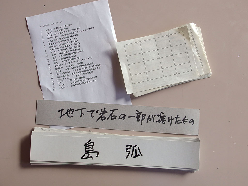 暗記ドリルマッキーノに使う，リスト，記入用紙，フラッシュカードの例